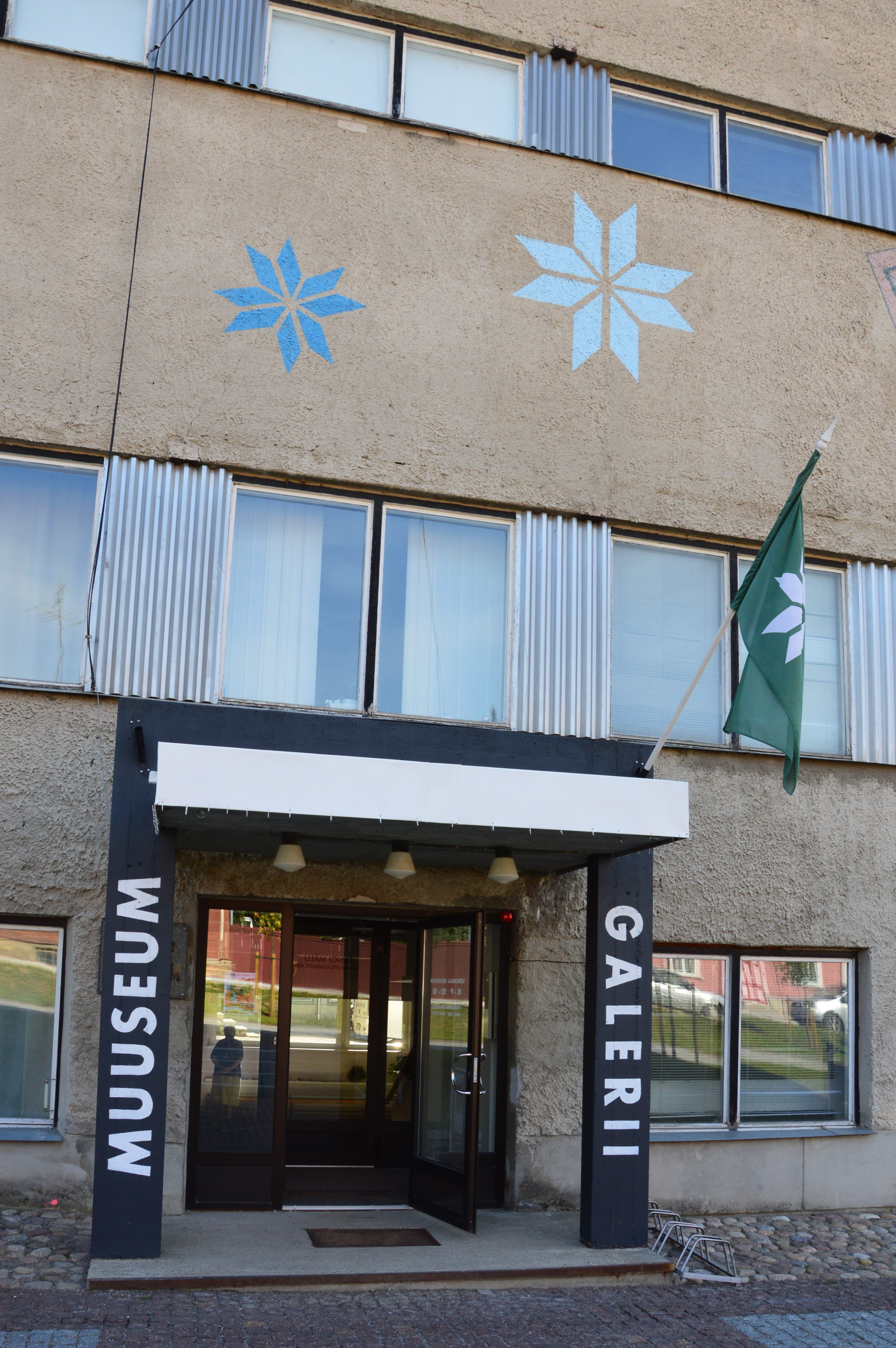 Võrumaa muuseum